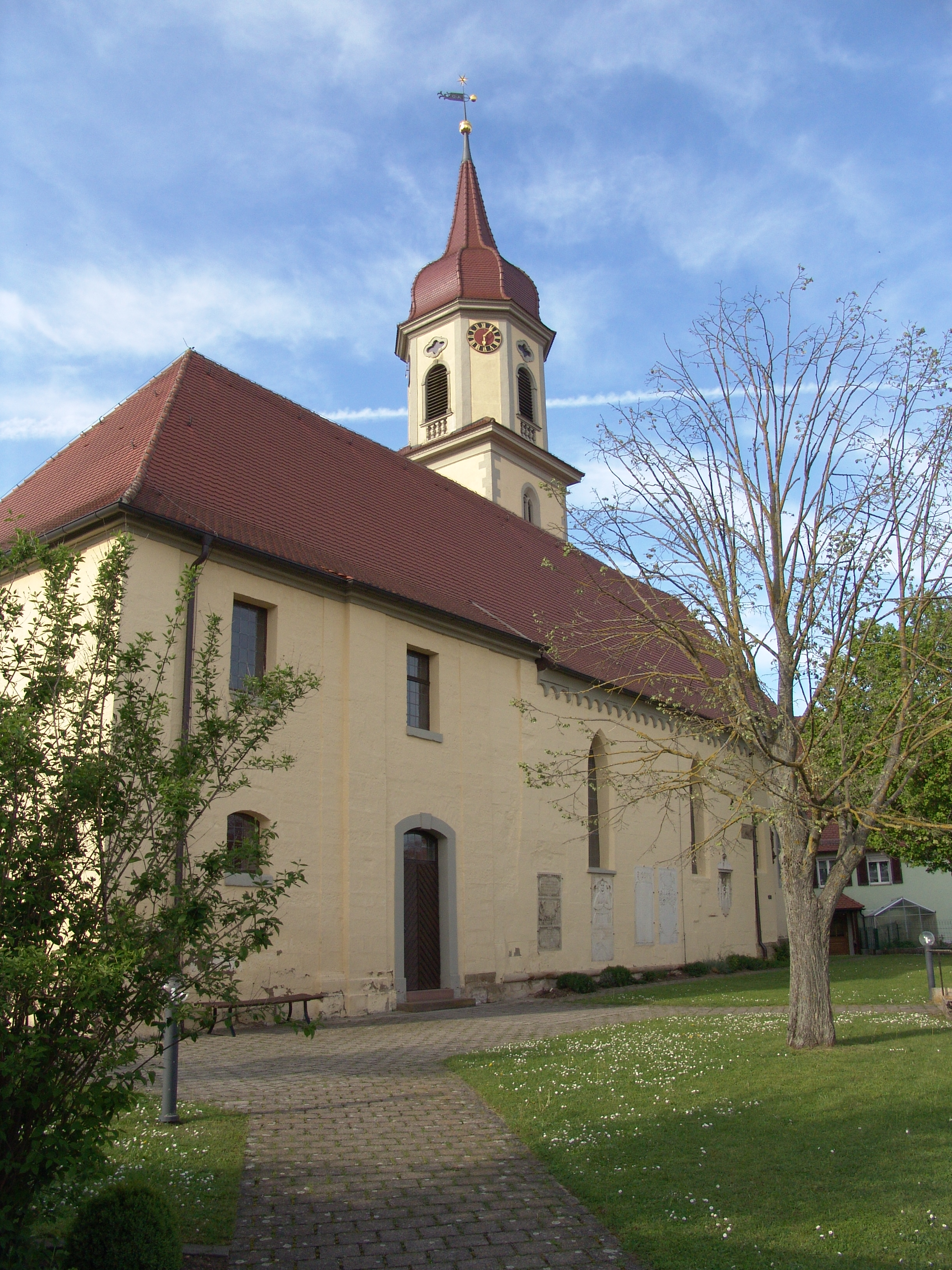 evang.-luth. Kirche St. Laurentius in Röckingen